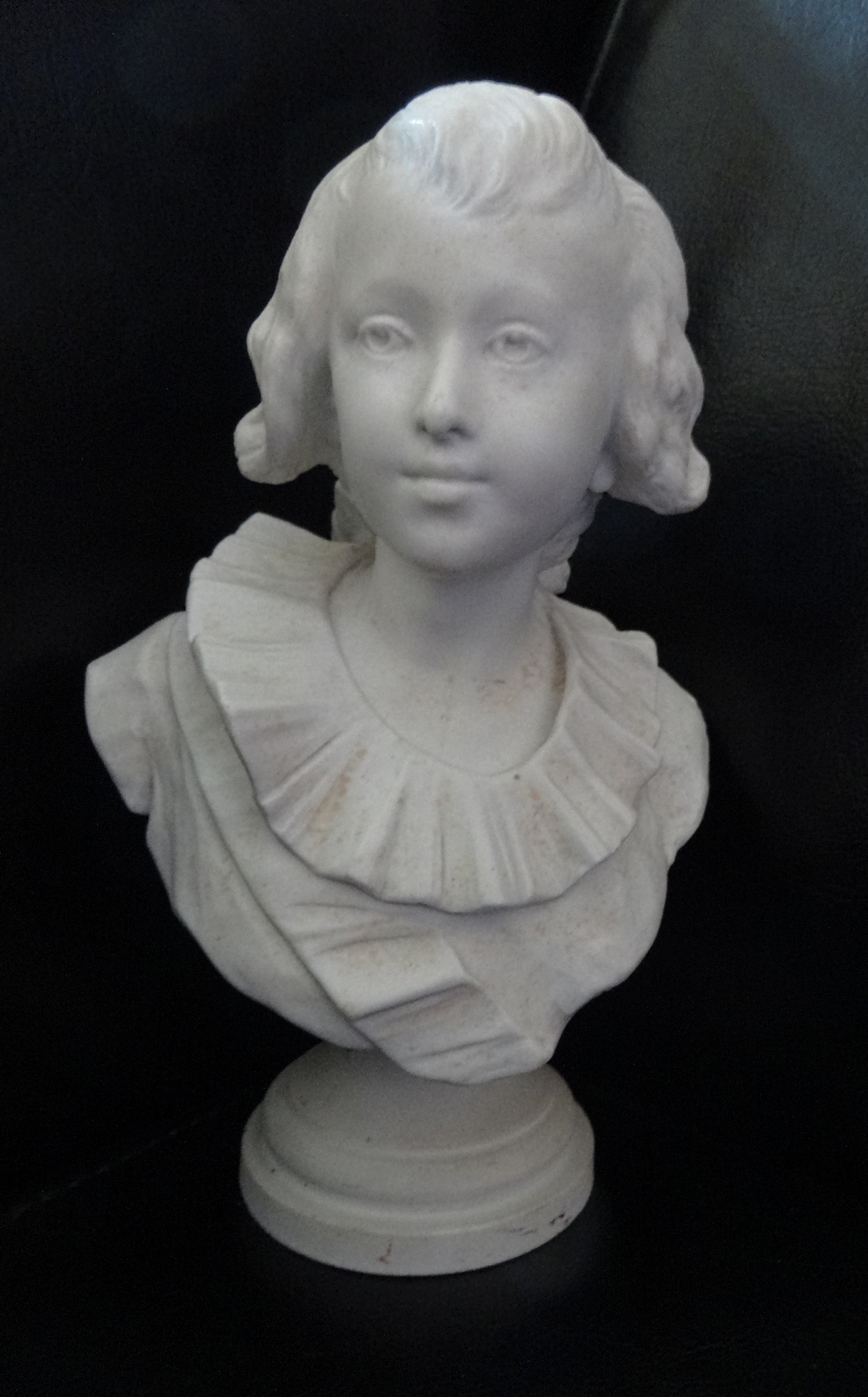 Buste d'enfant, biscuit signé Gustave Deloye (1838-1899), édité par Paul ou Henri Milet. Marque « PM Sèvres » sous le socle. Portrait probable d'un enfant de la noblesse de la fin du XVIIIe siècle, ou figure de fantaisie dans le goût de cette époque. Collection particulière non localisée.